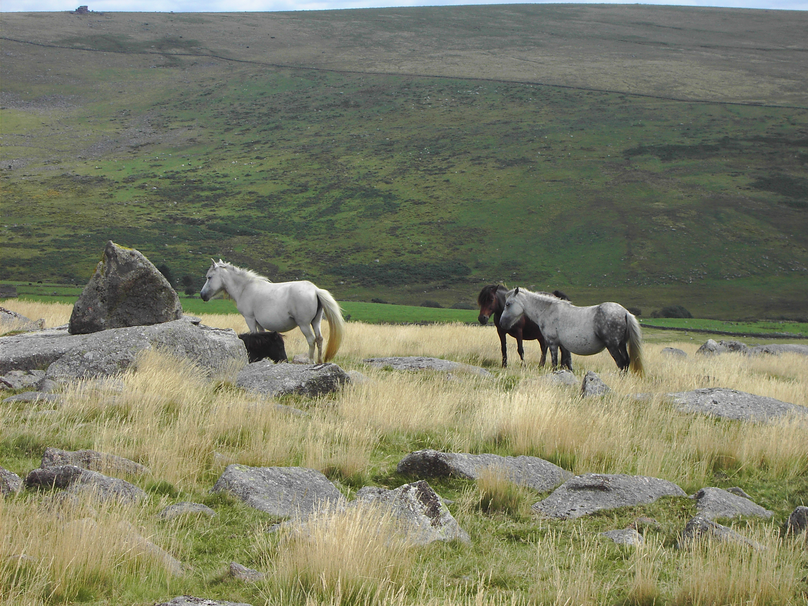 Dartmoor Ponies